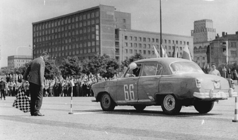 III. Internationale Automobil-Rallye "Für Frieden und Freundschaft" 72 Fahrzeuge aus der Sowjetunion, Volkspolen, der CSSR, der DDR, Bulgarien und Ungarn bestreiten die über 5000 km führende III. Internationale Automobil-Rallye "Für Frieden und Freundschaft" vom 2.-7. September 1962. Die Strecke führt vom Startort Tihany am Plattensee durch Ungarn, die CSSR, bis zum Wendepunkt Kiew und von dort durch Volkspolen, nochmals durch die CSSR bis zum Endziel Dresden. Am 6. September erreichen die Fahrzeuge die Oder-Neiße-Friedensgrenze bei Görlitz, um von dort aus die letzten 850 km durch das Gebiet unserer Republik in Angriff zu nehmen. Eine Sonderprüfung auf dem Dresdener Altmarkt beschließt am Nachmittag des 7. September diese Friedensfahrt der Motorsportler. UBz: Bei den vielen Sonderprüfungen kommt es manchmal sogar auf den Zentimeter an."